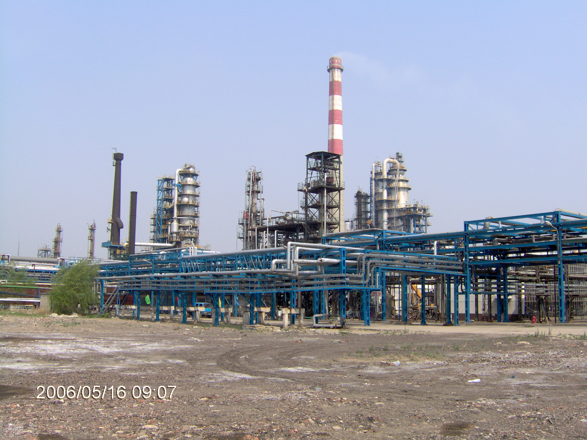 Fushun 石油二厂